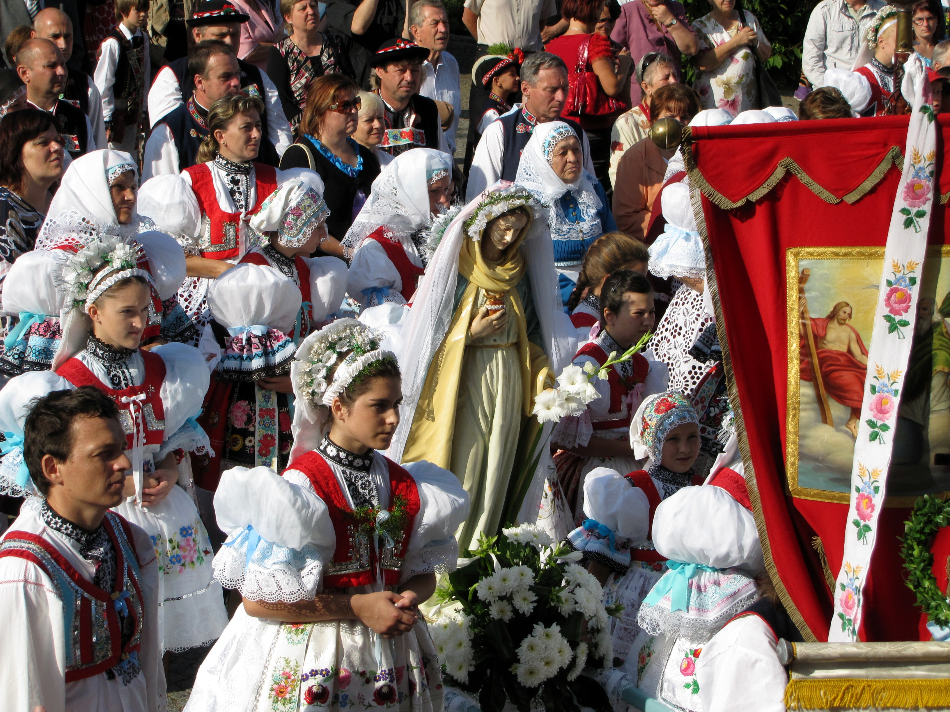 Mariánská pouť - věřící v krojích před kostelem Nanebevzetí Panny Marie v Kyjově v 14. srpna 2011